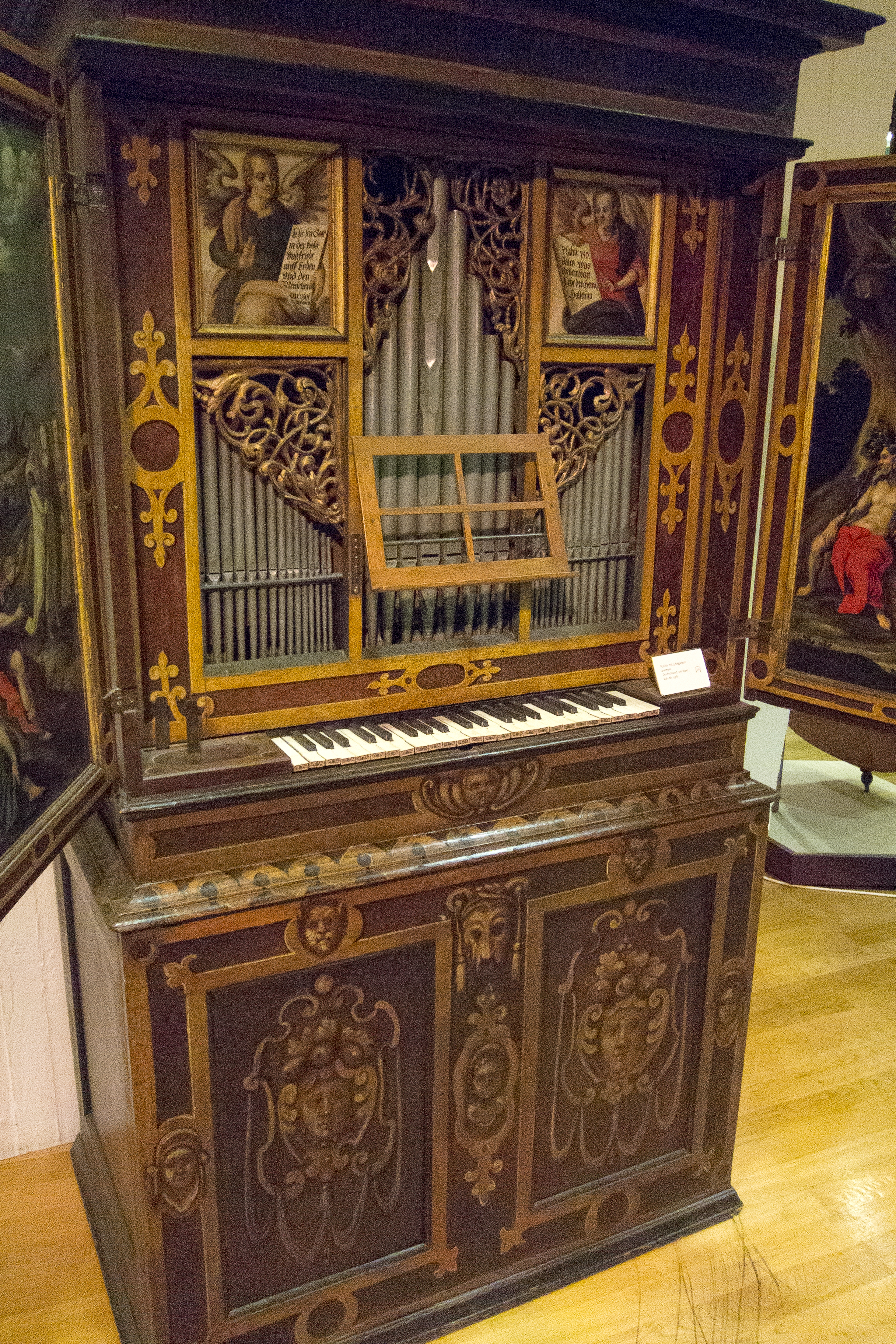 Berlin 2012